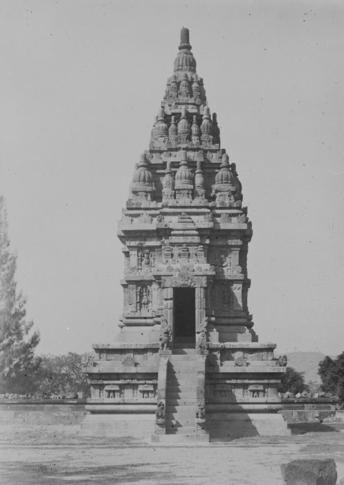 foto. De Candi Lara Jonggrang oftewel het Prambanan tempelcomplex